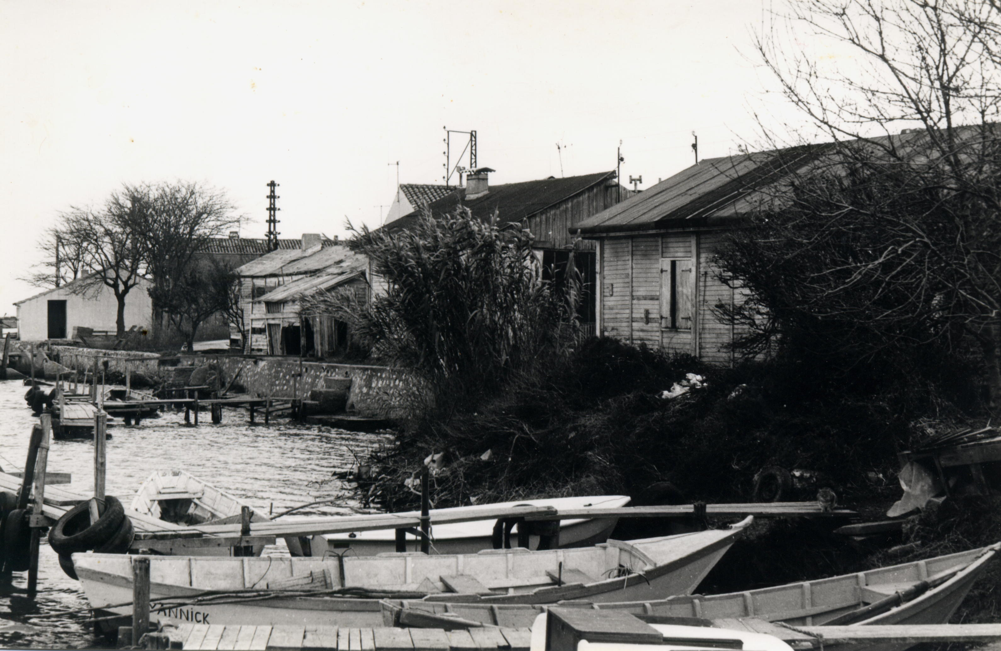 avant leur destruction en 1977 , les anciennes barraques des pêcheurs